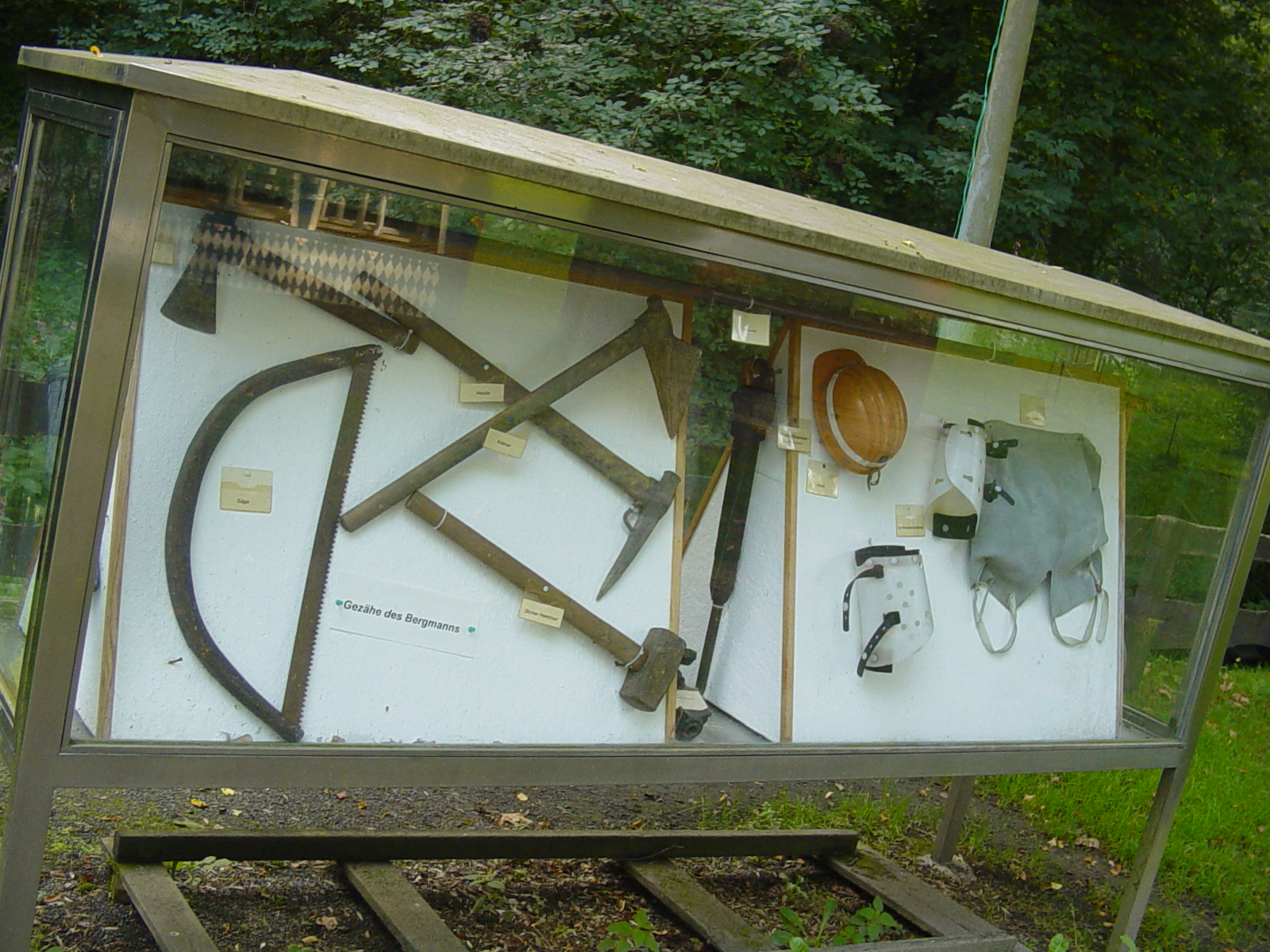 Werkzeuge der Bergleute aus der Ausstellung am Zechenhaus Herberholz am Bergbauwanderweg Muttental.